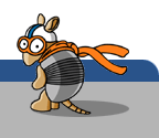 Az Armadillo Aerospace logója